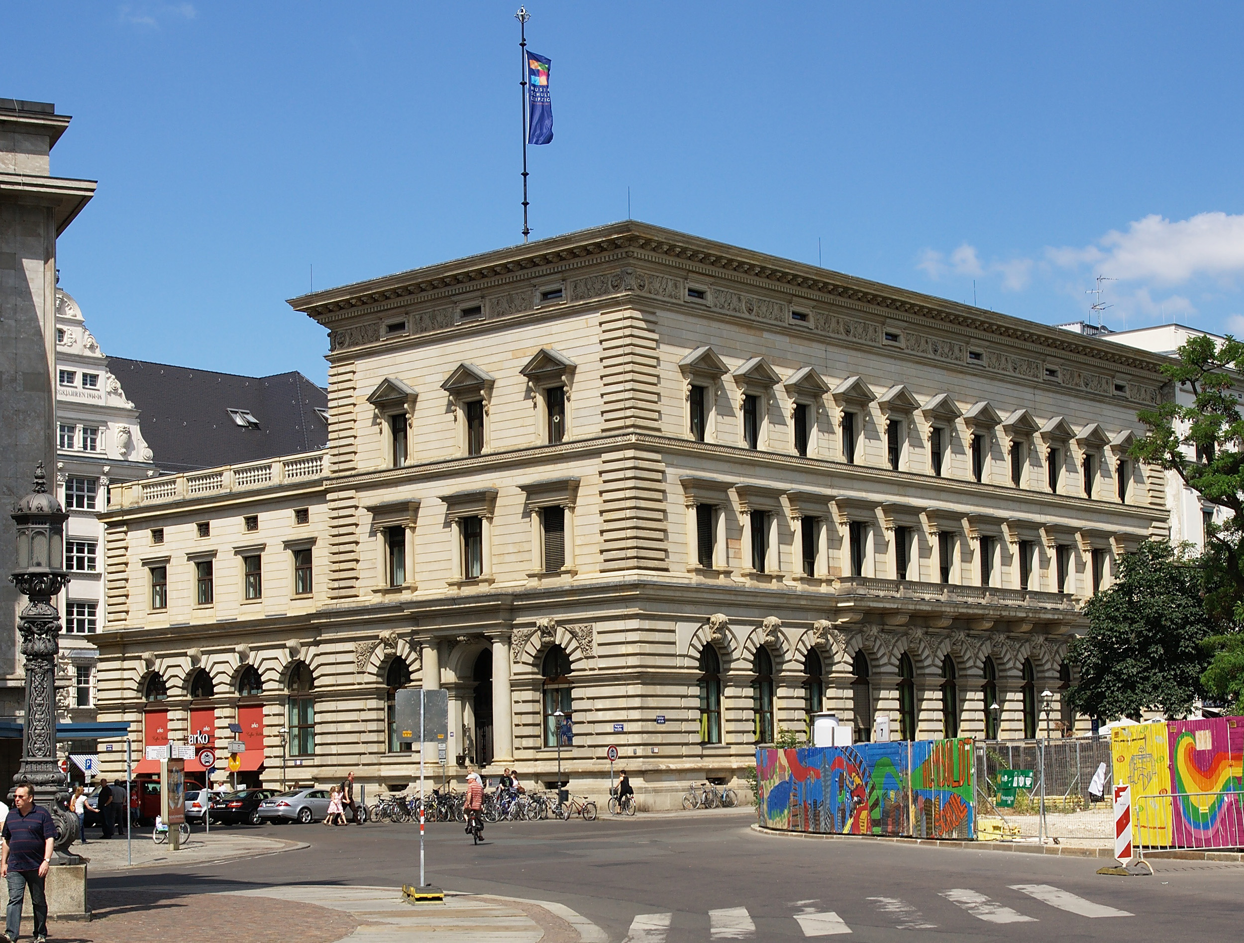 1886/87 von Max Hasak (1856–1934) errichtete Reichsbank-Hauptstelle Leipzig, später Leipziger Filiale der Staatsbank der DDR. Heute Musikschule „Johann Sebastian Bach“ in Leipzig.